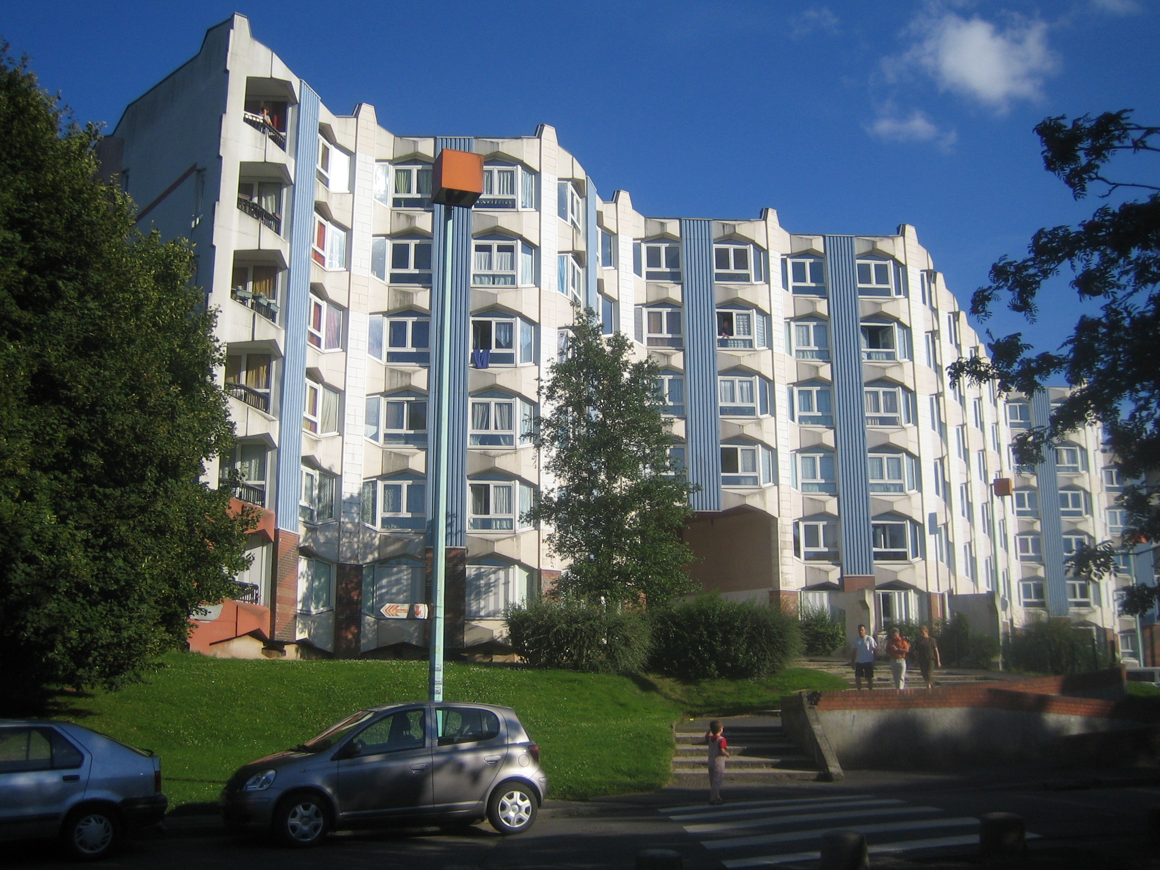 Immeubles de l'allée Taylerand, Triolo, Villeneuve d'Ascq